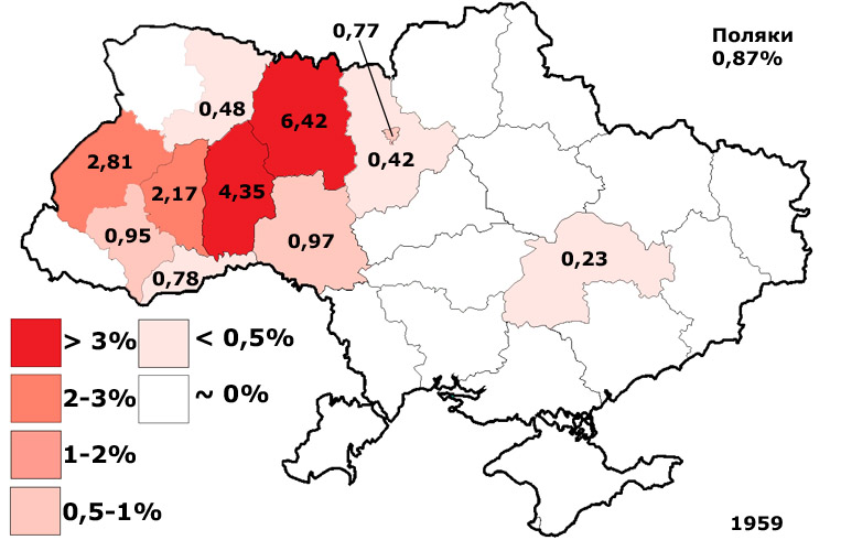 Поляки в Україні 1959: мапа